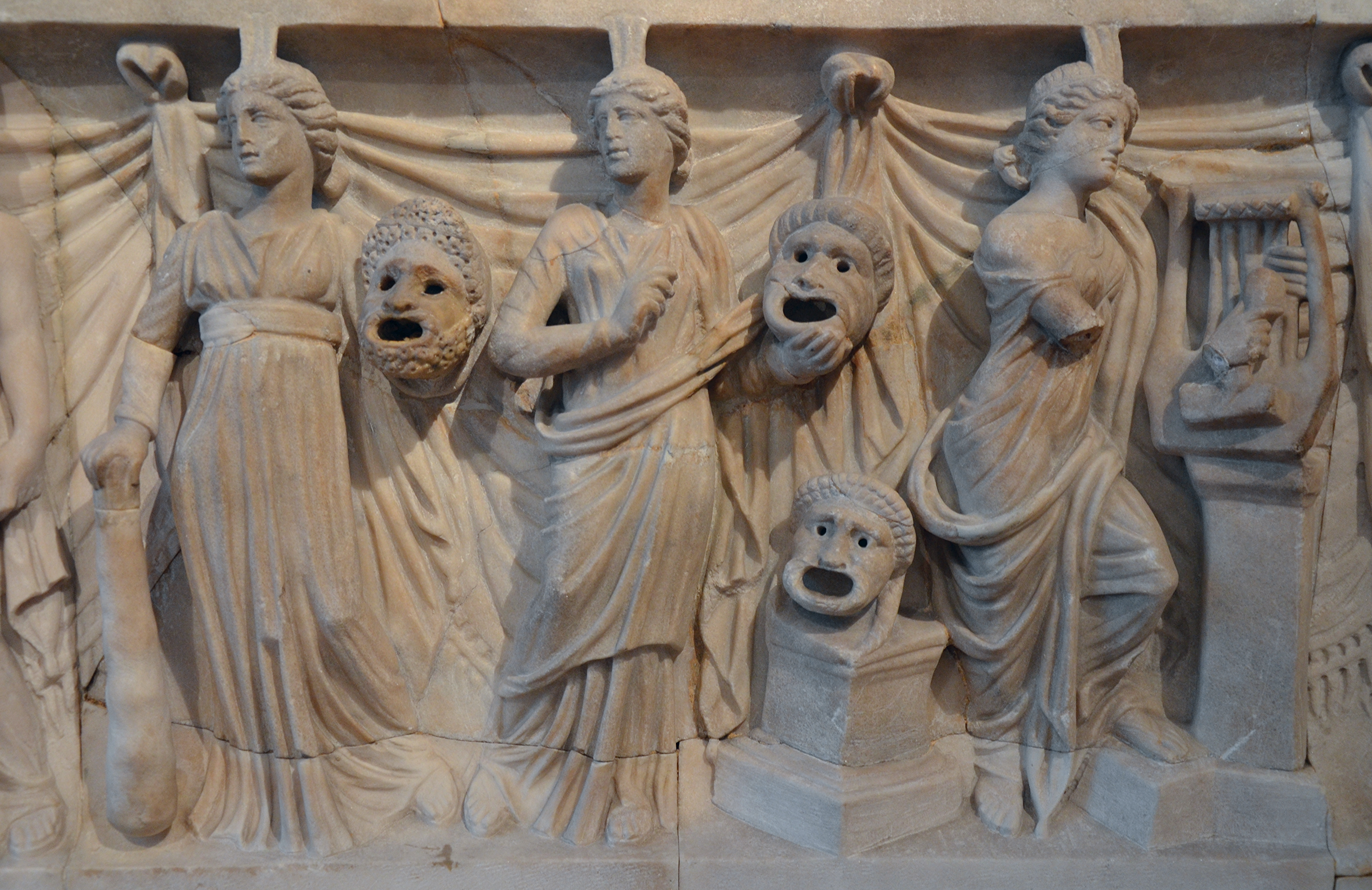 Detail of a sarcophagus relief with Muses and theatrical masks, from the Via Appia in Rome, around 200 AD, Altes Museum, Berlin